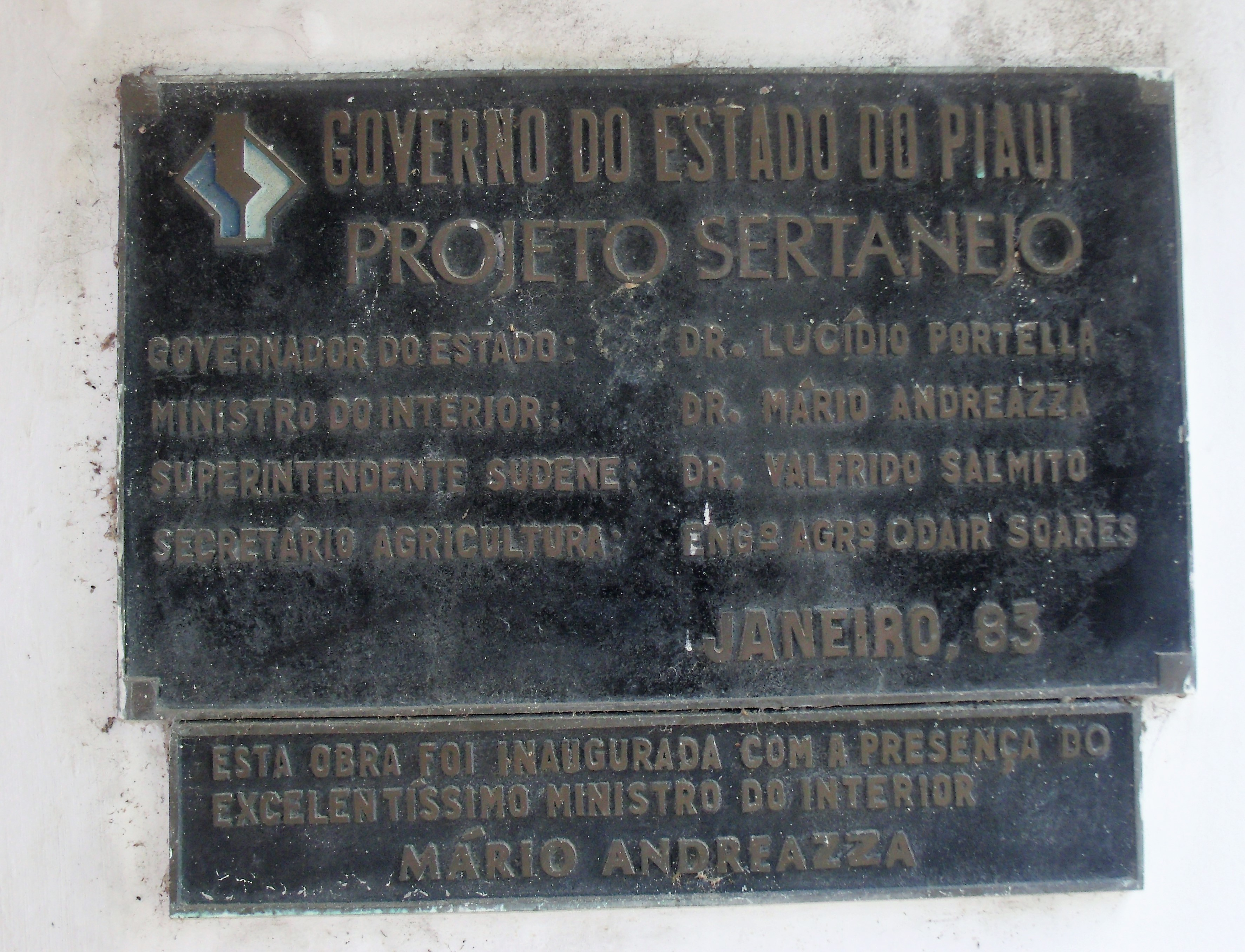 Placa de um prédio público no Piauí como o nome de Mário Andreazza. A placa tem, também, a logomarca do governo Lucídio Portela.